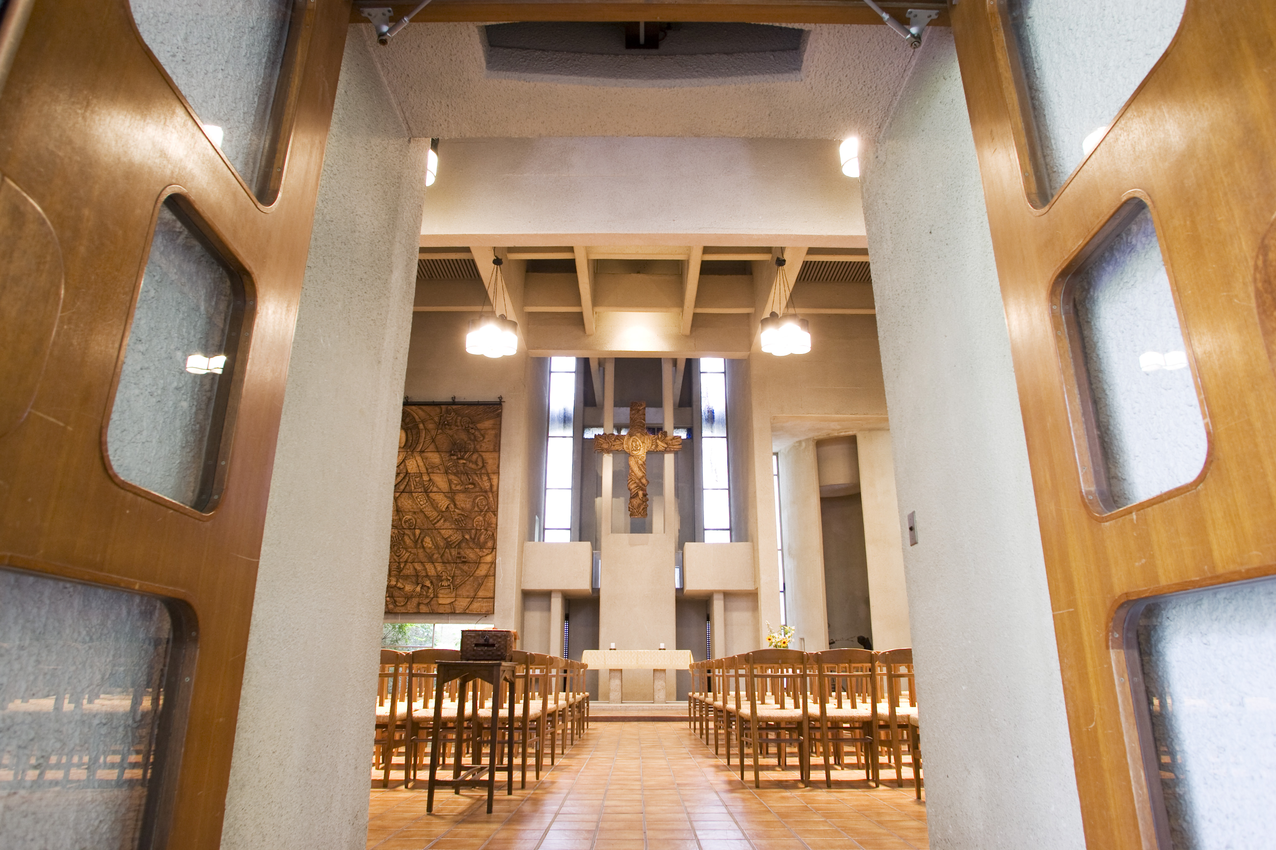 ルーテル学院大学チャペル